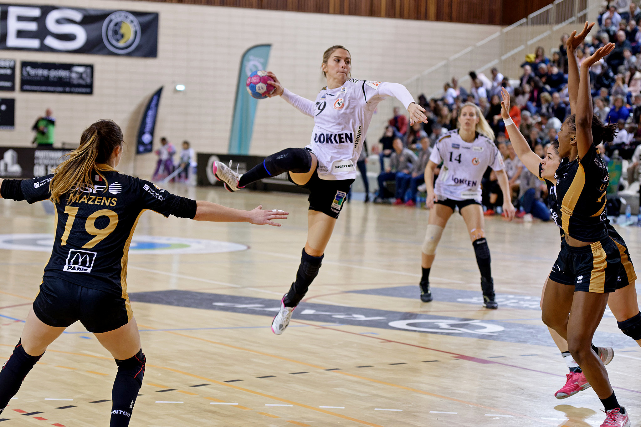 Lors de la rencontre du 3e tour de la Coupe EHF entre Paris 92 et les danoises de Team Esbjerg. A Issy les moulineaux, le 18 novembre 2018.